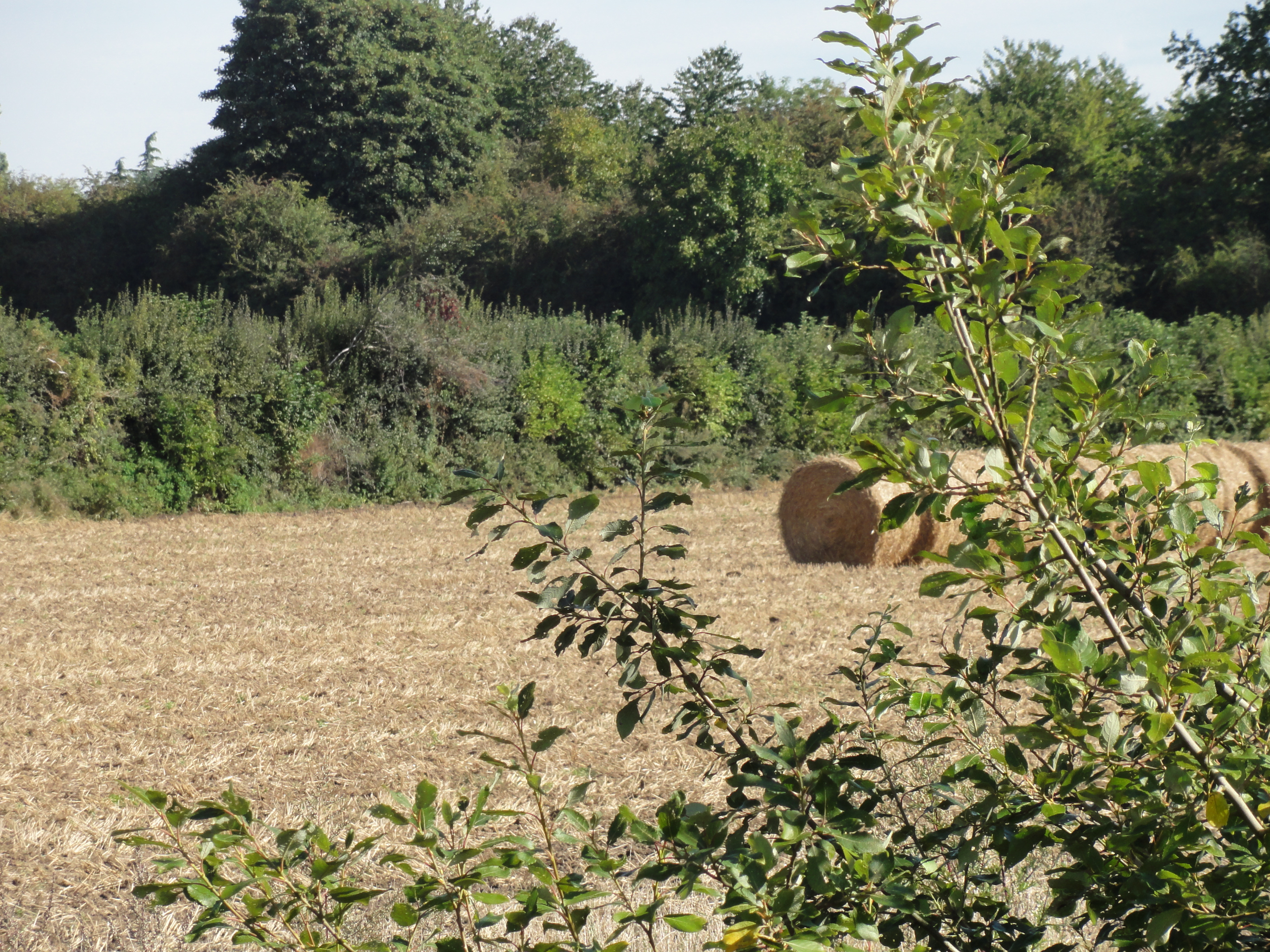 Terril n° 237 dit Cavalier Voie du 8 au 11, fosse n° 8 - 8 bis de la Compagnie des mines de Nœux dans le bassin minier du Nord-Pas-de-Calais, Verquin, Pas-de-Calais, Nord-Pas-de-Calais, France.